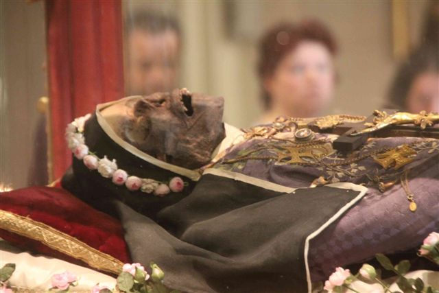 Giovanna da Signa, comunemente chiamata Beata Giovanna (Castello di Signa, ... – 9 novembre 1307) è una figura di culto della Chiesa Cattolica.